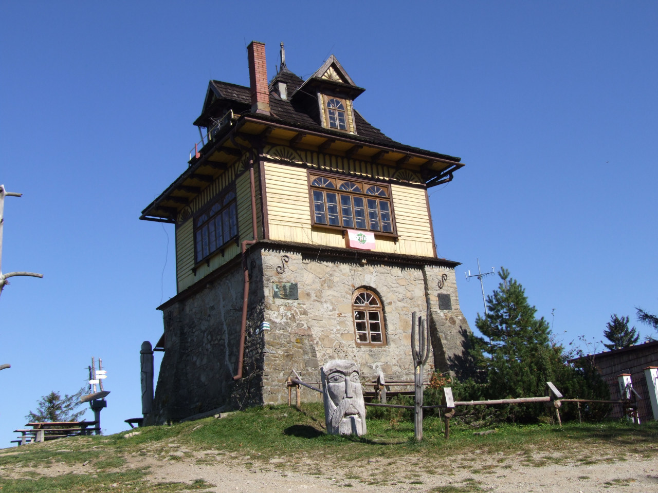 Schronisko PTTK Luboń Wielki (Beskid Wyspowy)